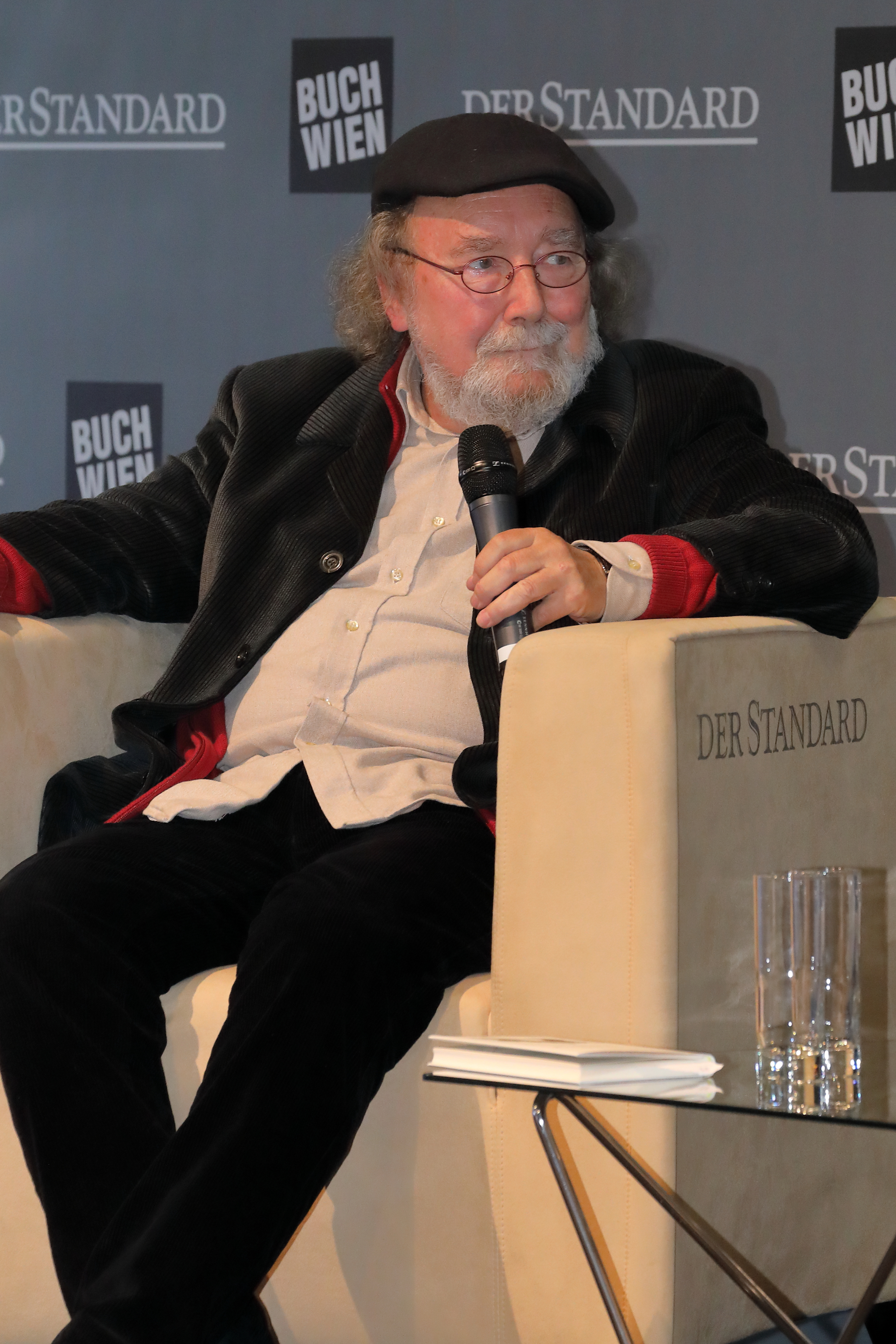 Der österreichischer Schriftsteller, Journalist und Musiker Peter Henisch bei der Präsentation seines Buches „Siebeneinhalb Leben“ auf der Standard-Bühne der Wiener Buchmesse 2018.